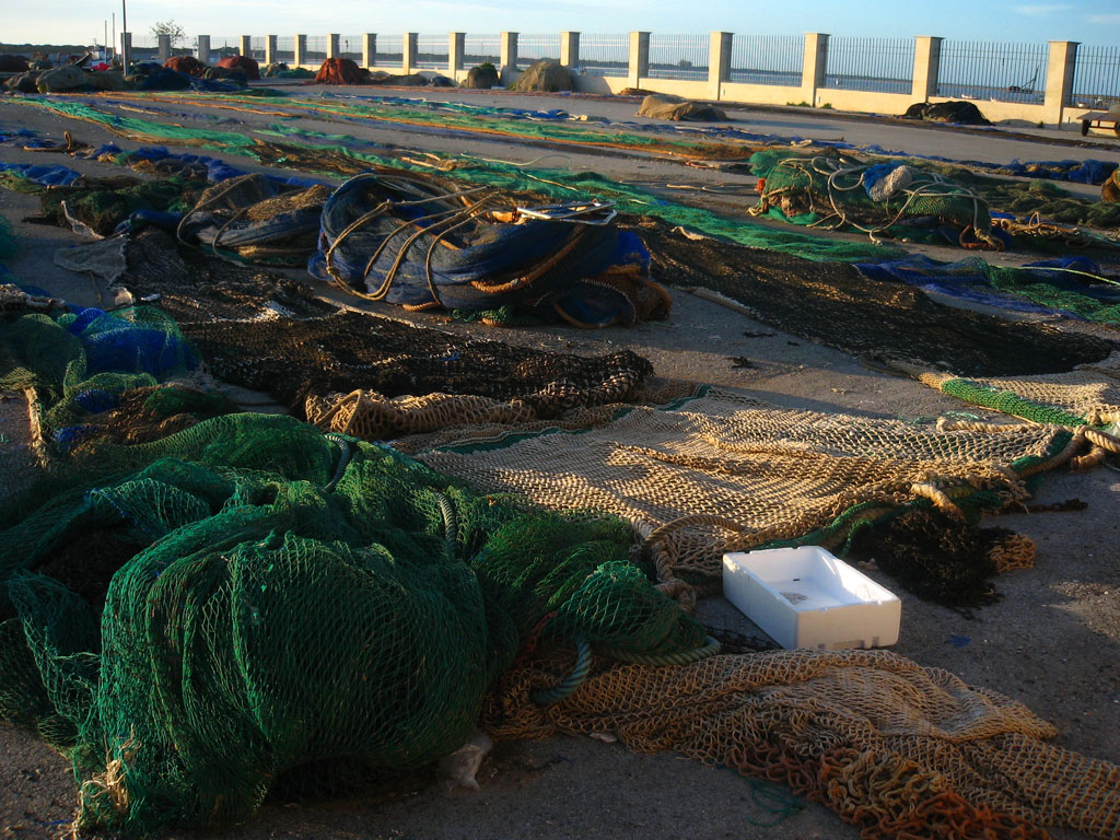 Puerto de Bonanza, Sanlúcar de Barrameda (España) / Port of Bonanza, Sanlúcar de Barrameda (Spain)